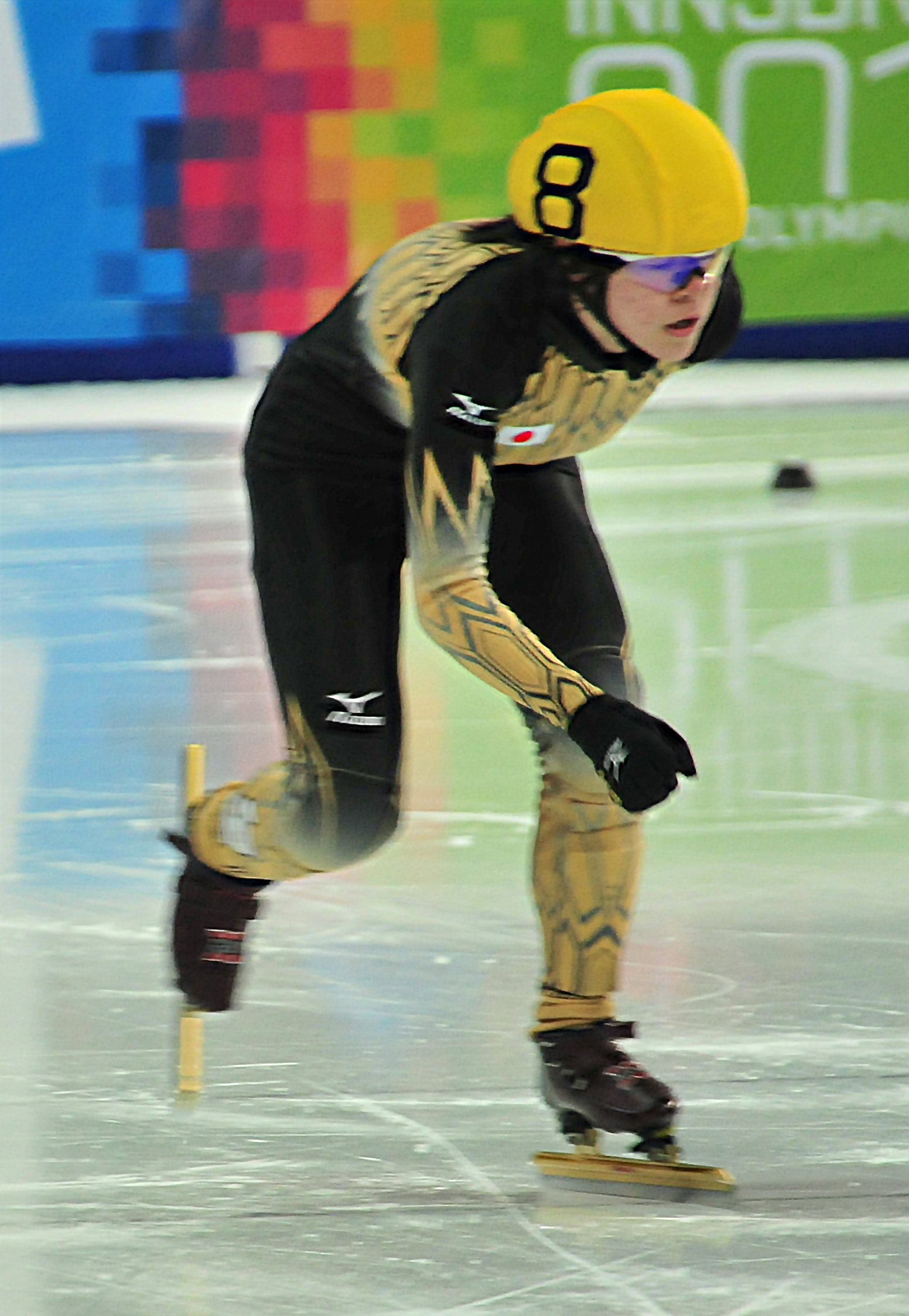 1. Jugendolympiade 2012 Innsbruck. Sumire Kikuchi (Japan). Short Track Speed Skating Wettbewerb Erste Olympische Jugend- Winterspiele 201213. bis 22. Jänner in Innsbruck Dieses Foto wurde durch die Unterstützung von Wikimedia Österreich und die Twoonix Software GmbH ermöglicht.